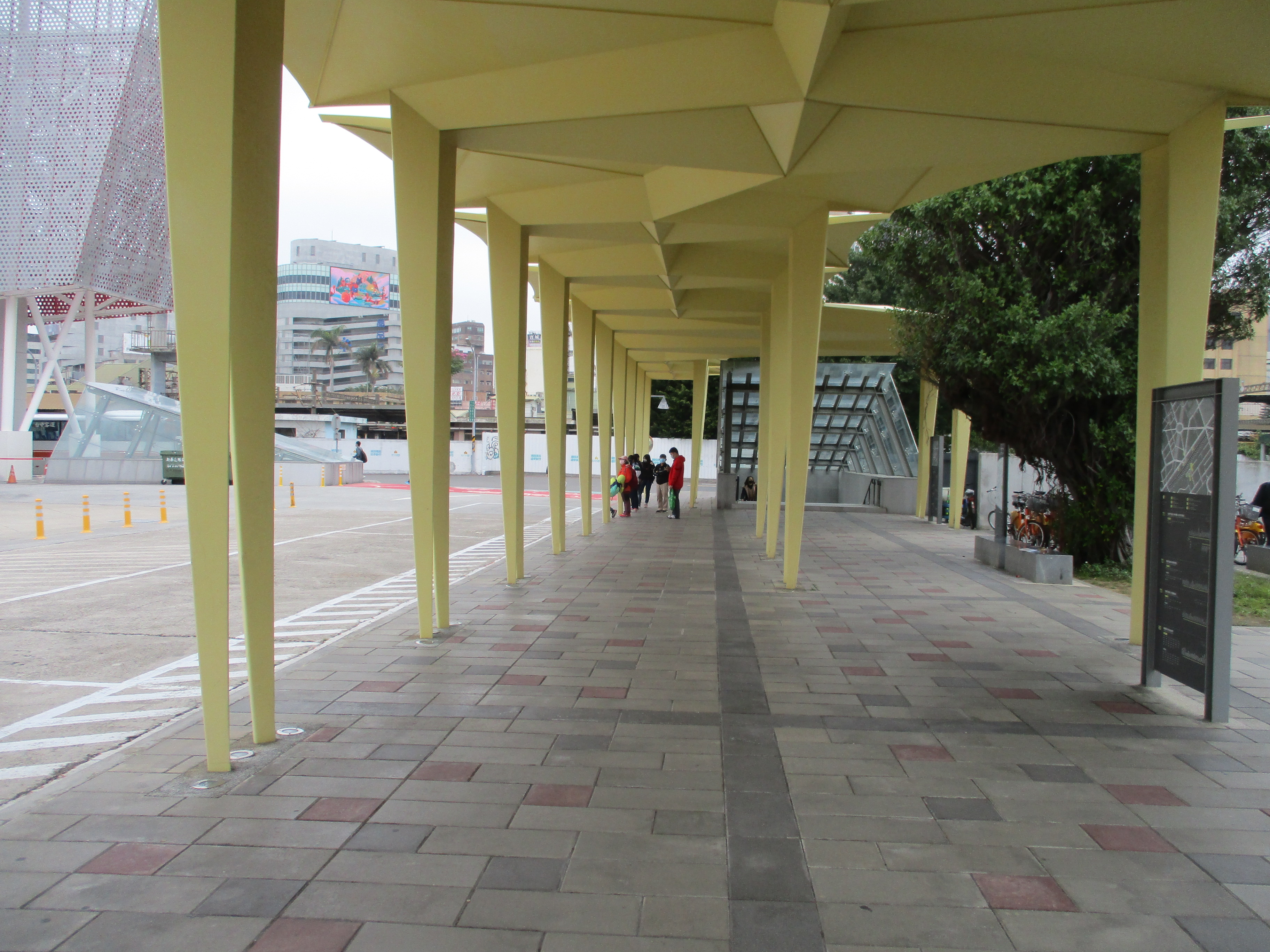 新竹轉運站市區公車候車區，以前曾做為轉運站接駁車之候車區